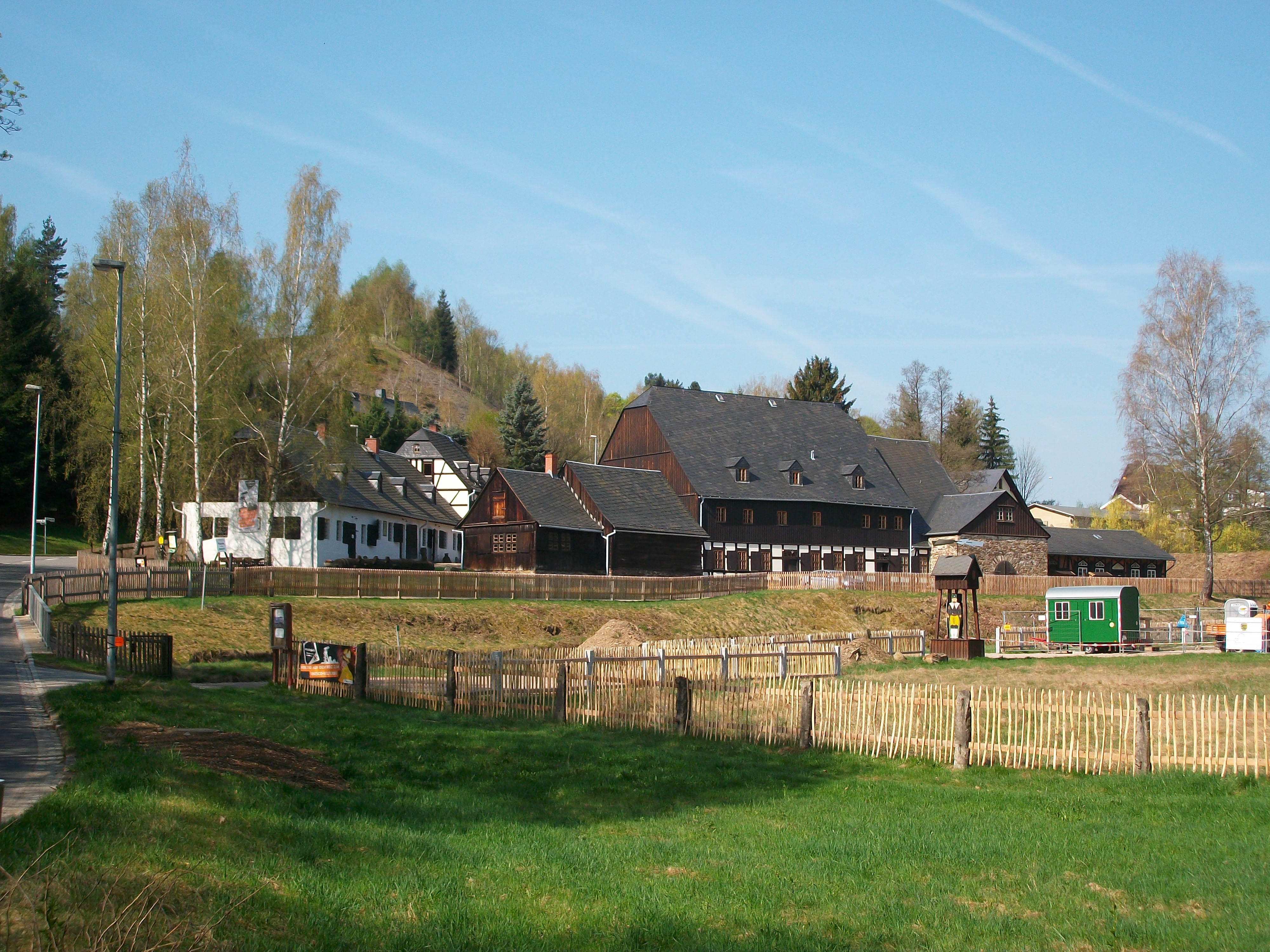 Siebenschlehener Pochwerk (Gesamtanlage) (2018)